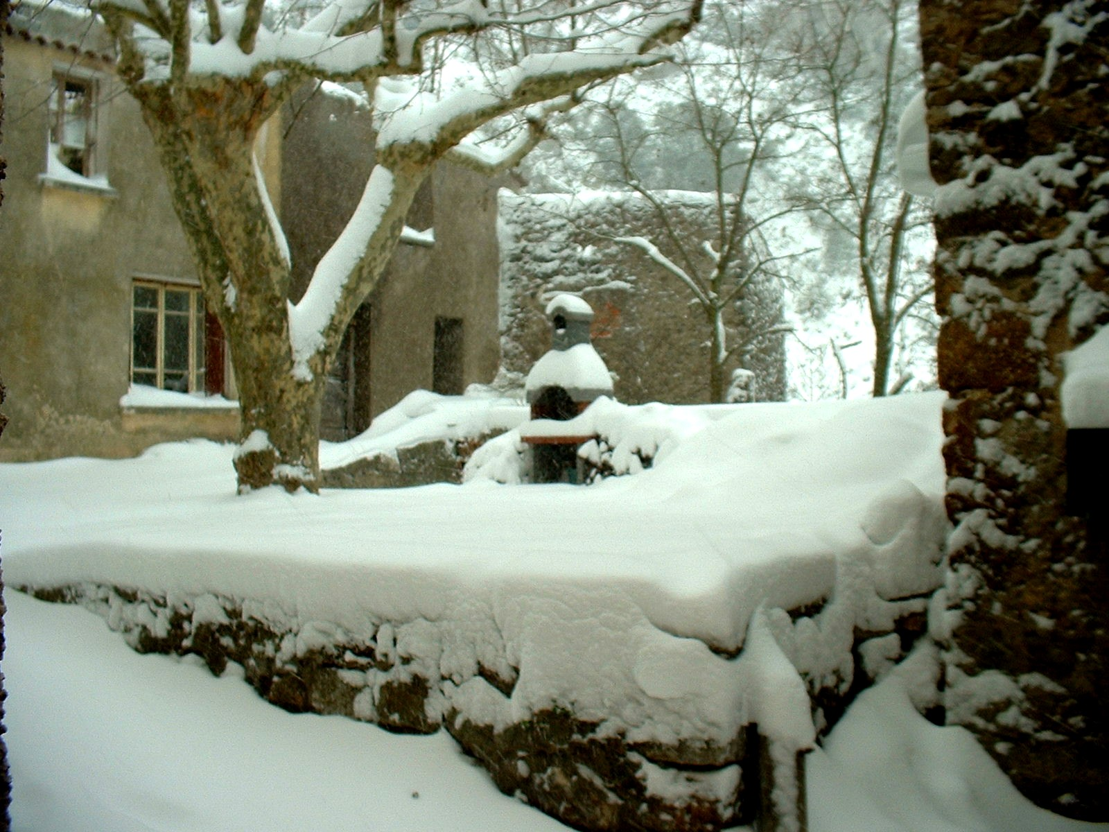 Laroque-de-Fa (Aude, France) - Neige